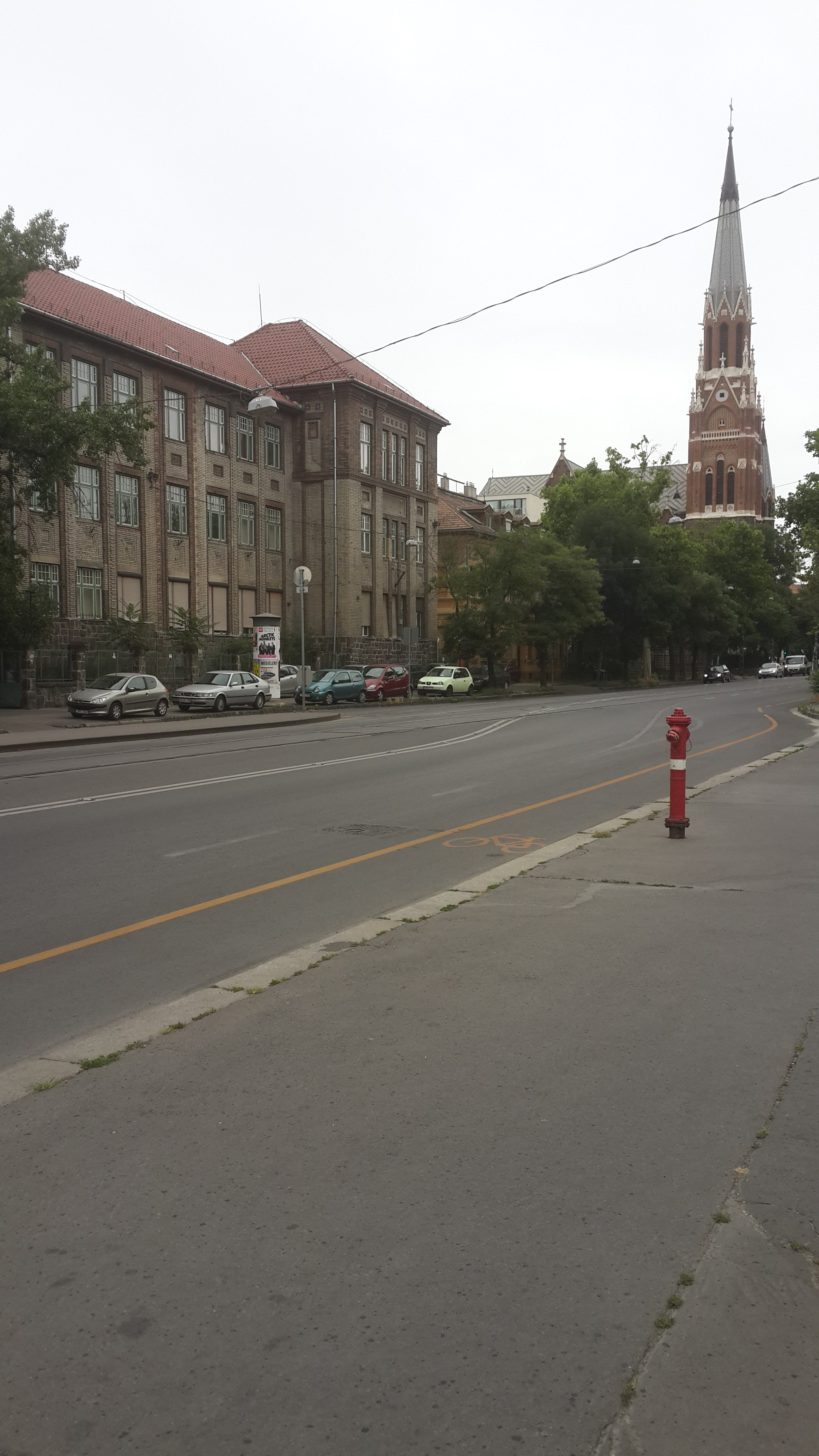 Petrik Lajos Szakközépiskola régi épülete a Thököly útról nézve. A távolban a Rózsafüzér Királynéja-templom (Budapest)